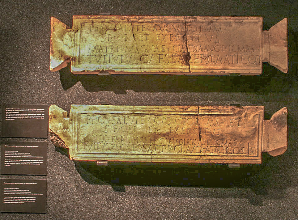 Tabulae ansatae der Claudia Icmas und des Virtulus, Taberna archaeologica, Mainz